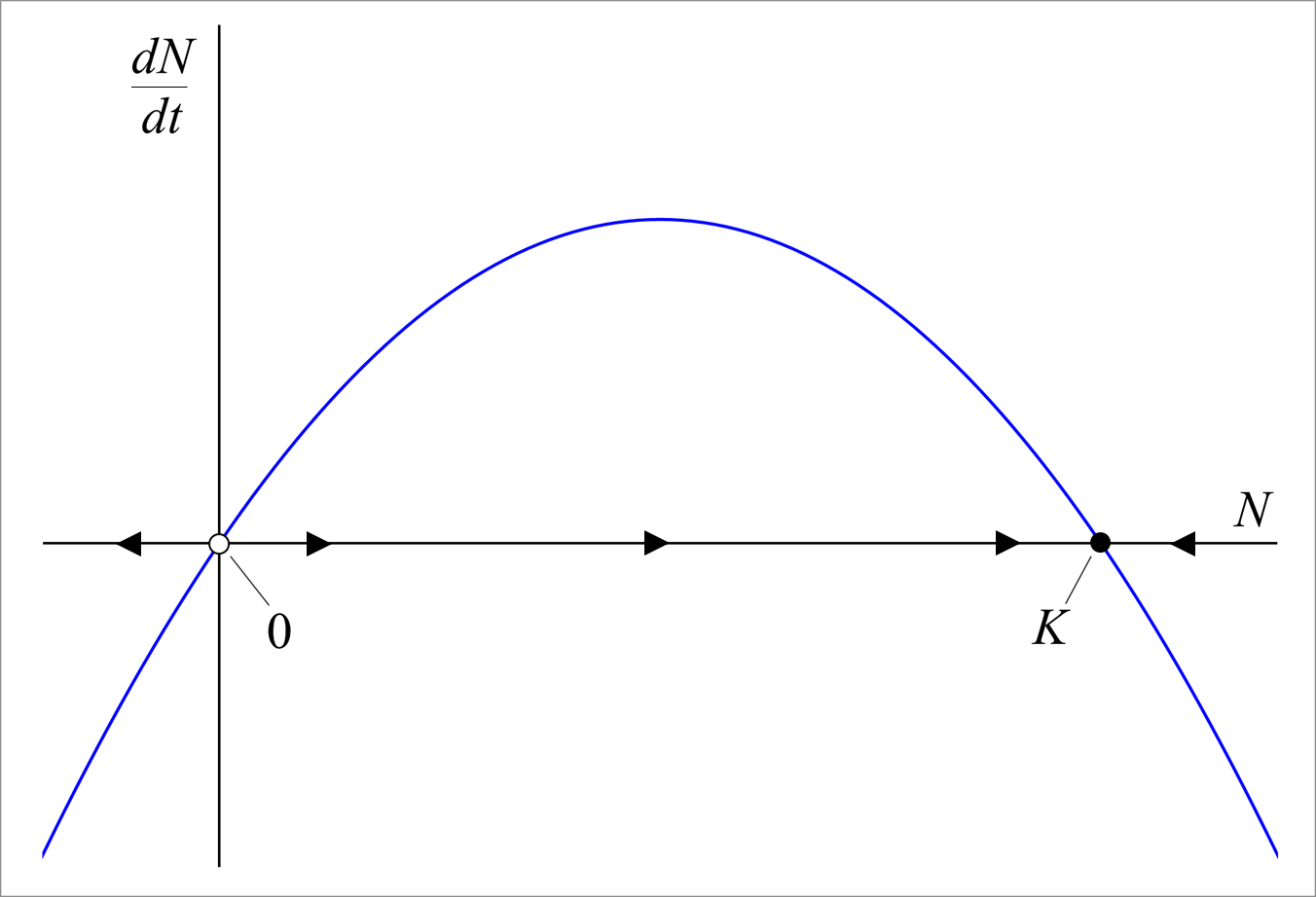 ロジスティック方程式の安定性概念図